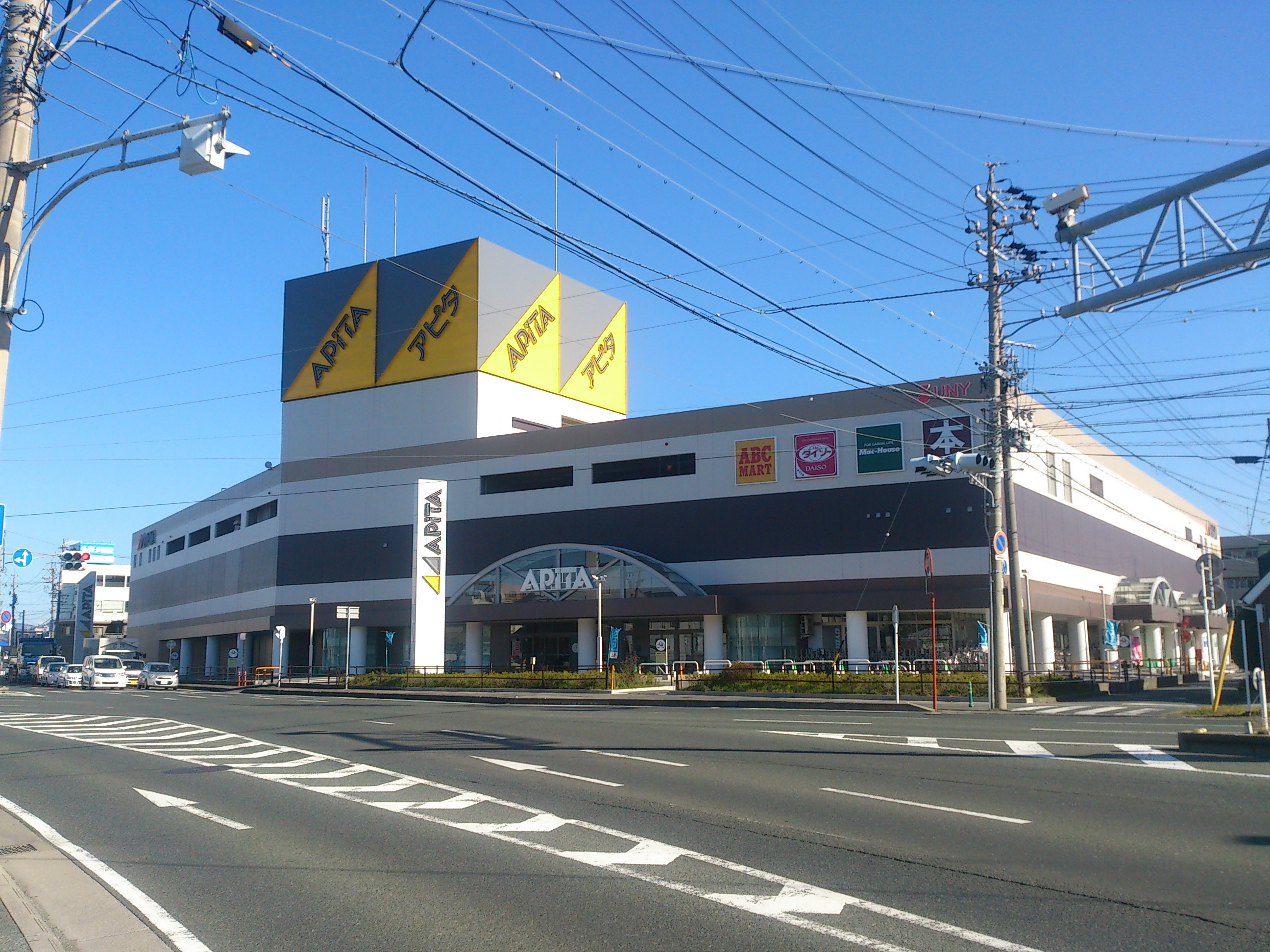 アピタ初生店外観